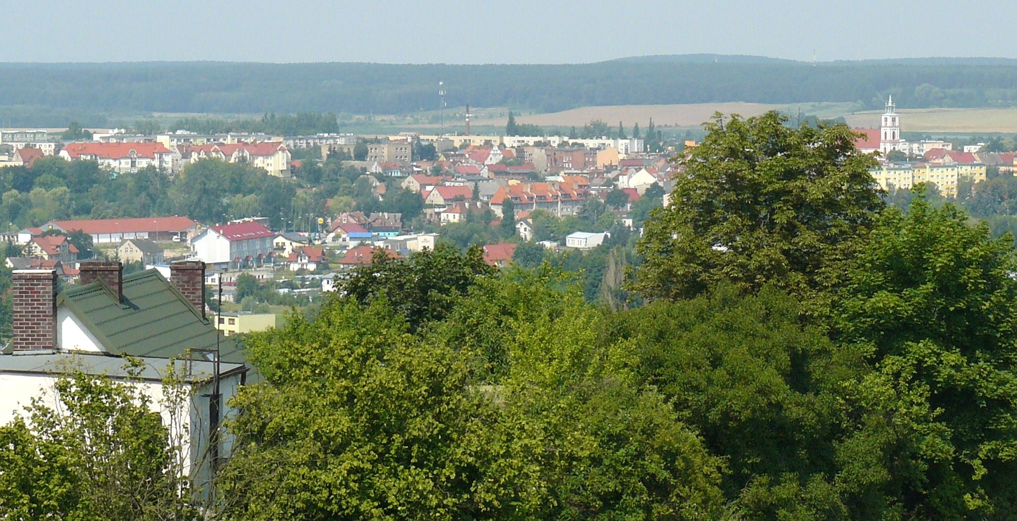 Chodzież - panorama miasta.